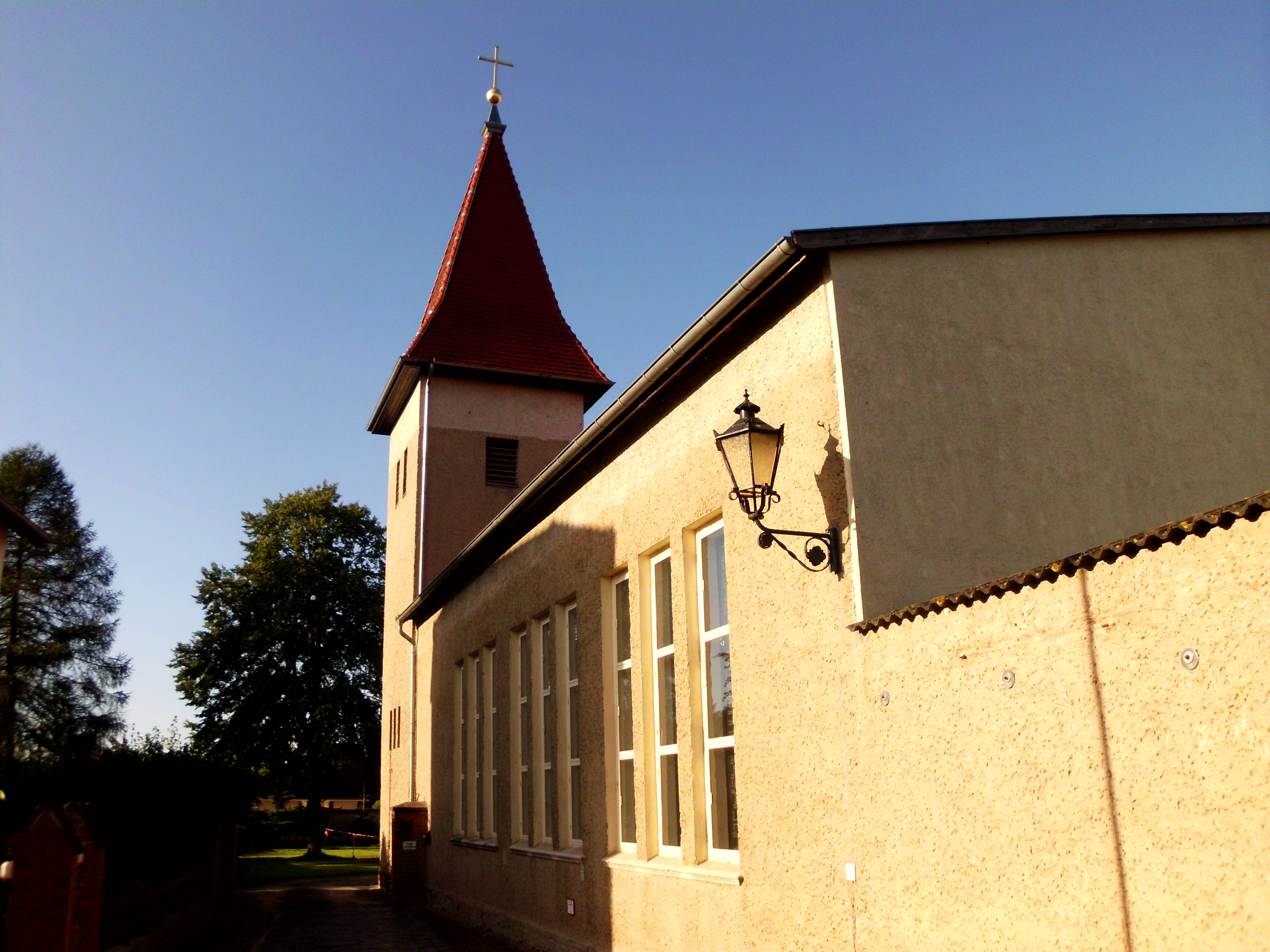 Die römisch-katholische Kirche Mariä Unbefleckte Empfängnis in Perleberg, Prignitz, Brandenburg. Eingerichtet Ende der 1880-er Jahre in einem ehem. Ausflugslokal, 1937 folgte der Kauf einer Orgel. 1939 gehörten 850 Katholiken zur Pfarrei, durch Vertriebene (v.a. Schlesier) stieg die Zahl bis 1953 auf etwa 1900 Mitglieder. 1953/54 erhielt die Kirche nach Plänen Karl Trägners eine Empore und einen Turm, dessen Spitze mangels Baumaterials nur stumpf ausgeführt wurde. Am 11. Juli 1954 wurde das Gotteshaus konsekriert. Maria Brandenburg entwarf den Kreuzweg und den Corpus, der auf einem dem Havelberger Tatzenkreuz nachempfundenen Kreuz über dem Altar hängt. Ihr Sohn Paul Brandenburg schuf Tabernakel und Pietà, die heute im Vorraum der Kirche steht. Von Ilse Lang-Scheer stammen die Fenster, die Szenen aus Leben und Legende Marias von Nazareth zeigen. Der Baukomplex aus Kirche und Pfarrhaus wurden 1995/96 von Grund auf saniert und bekam ein neues Dach. Am 29. Juni 1996 konsekrierte Weihbischof Wolfgang Weider die umgestaltete Kirche. Jahre später konnte dem Turmstumpf eine Spitze aufgesetzt werden, der so nunmehr eine Höhe von 23 m misst. Heute gehören zur Pfarrei 800 Katholiken.